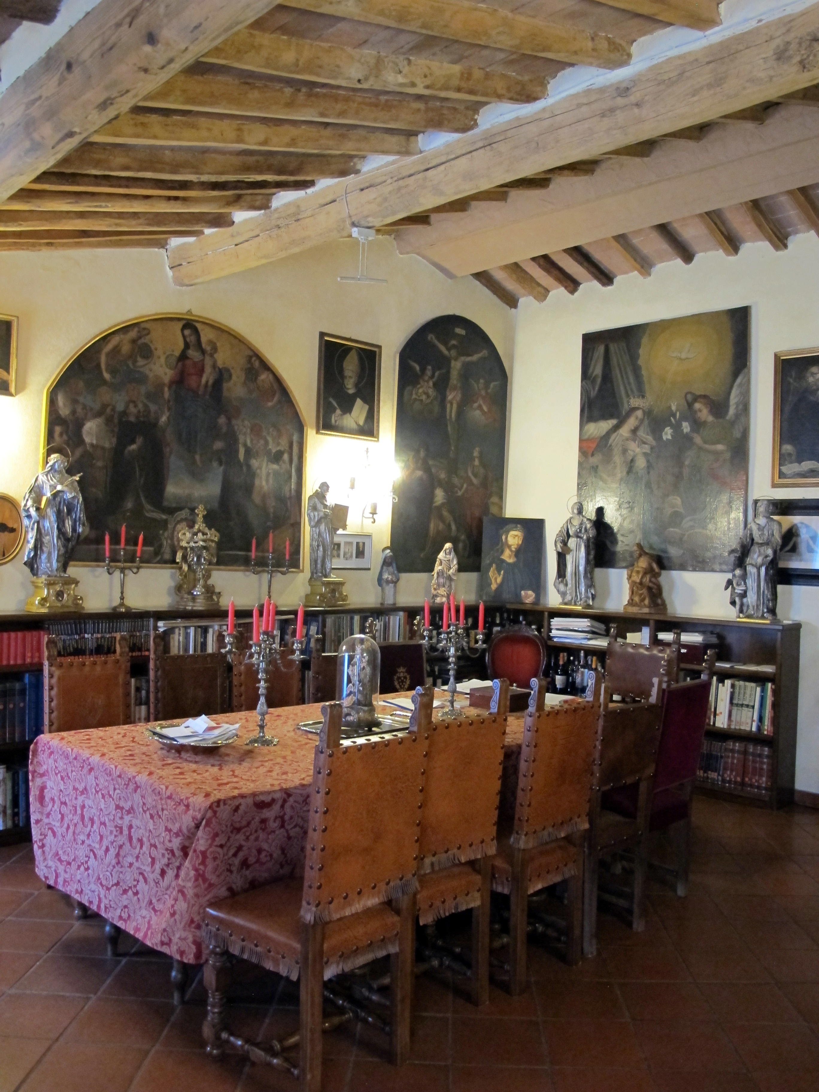 Castello della Magione